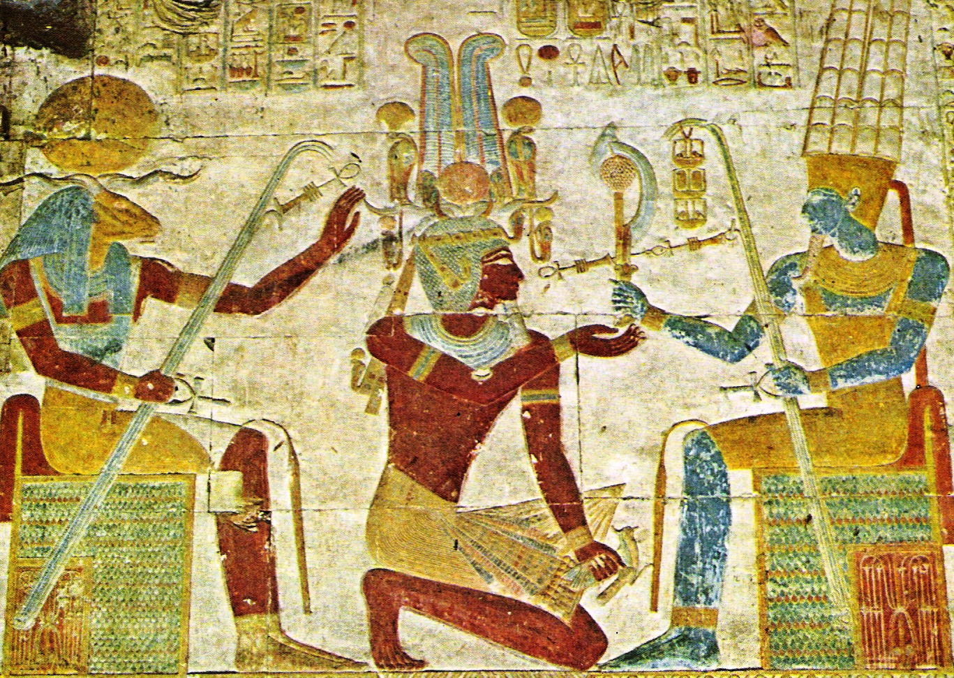 Khnum, Setos I. und Amun im Totentempel Sethos I. in Abydos